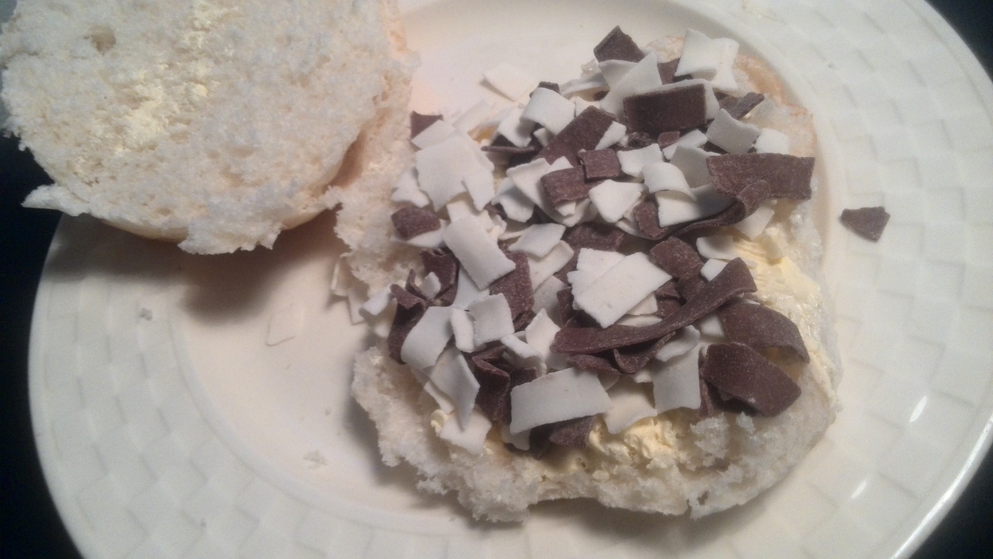 Een bolletje met chocoladevlokken in de variant gemengd.